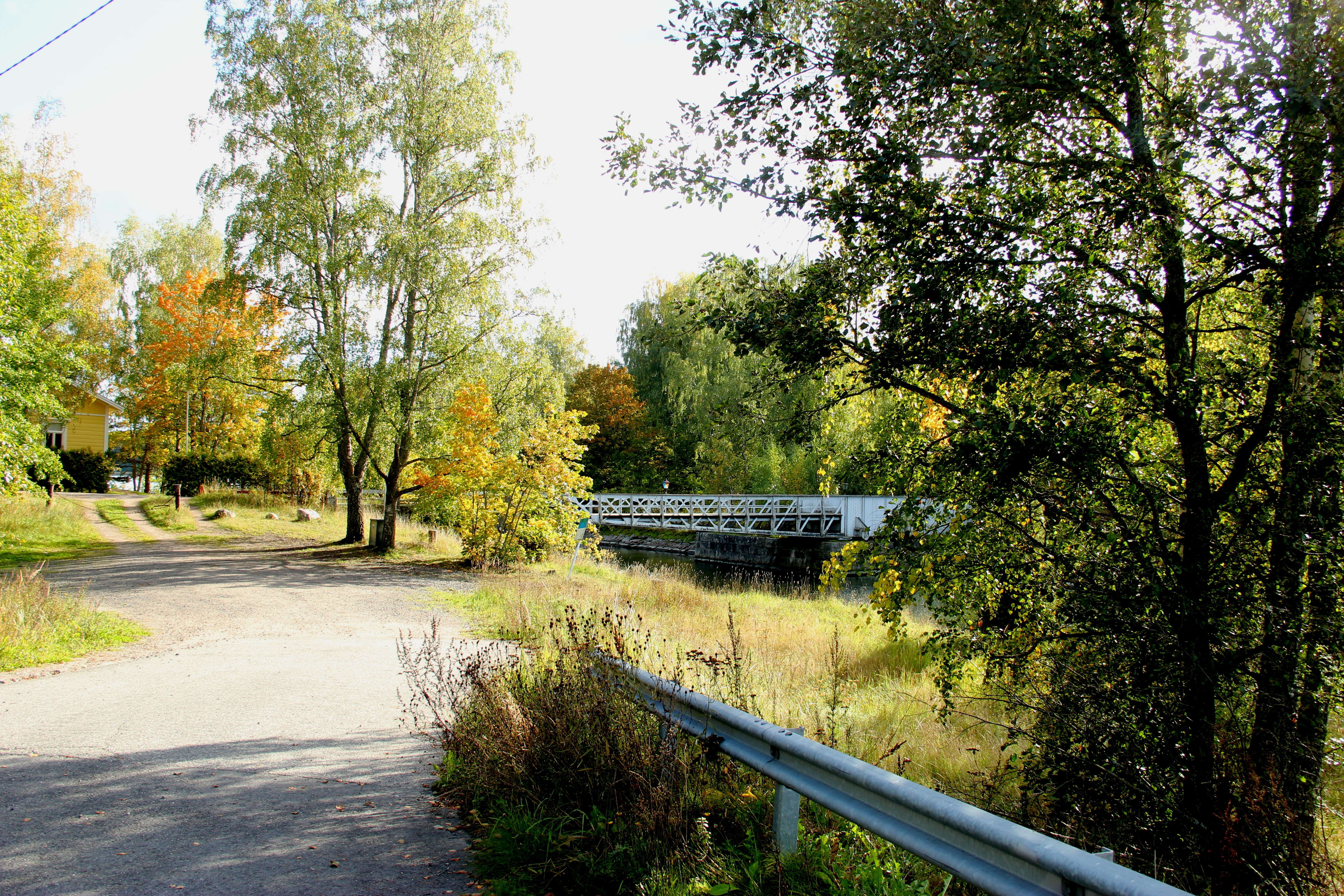 Vanha Strömman kanavan silta Kemiöntieltä (tie 184) kuvattuna